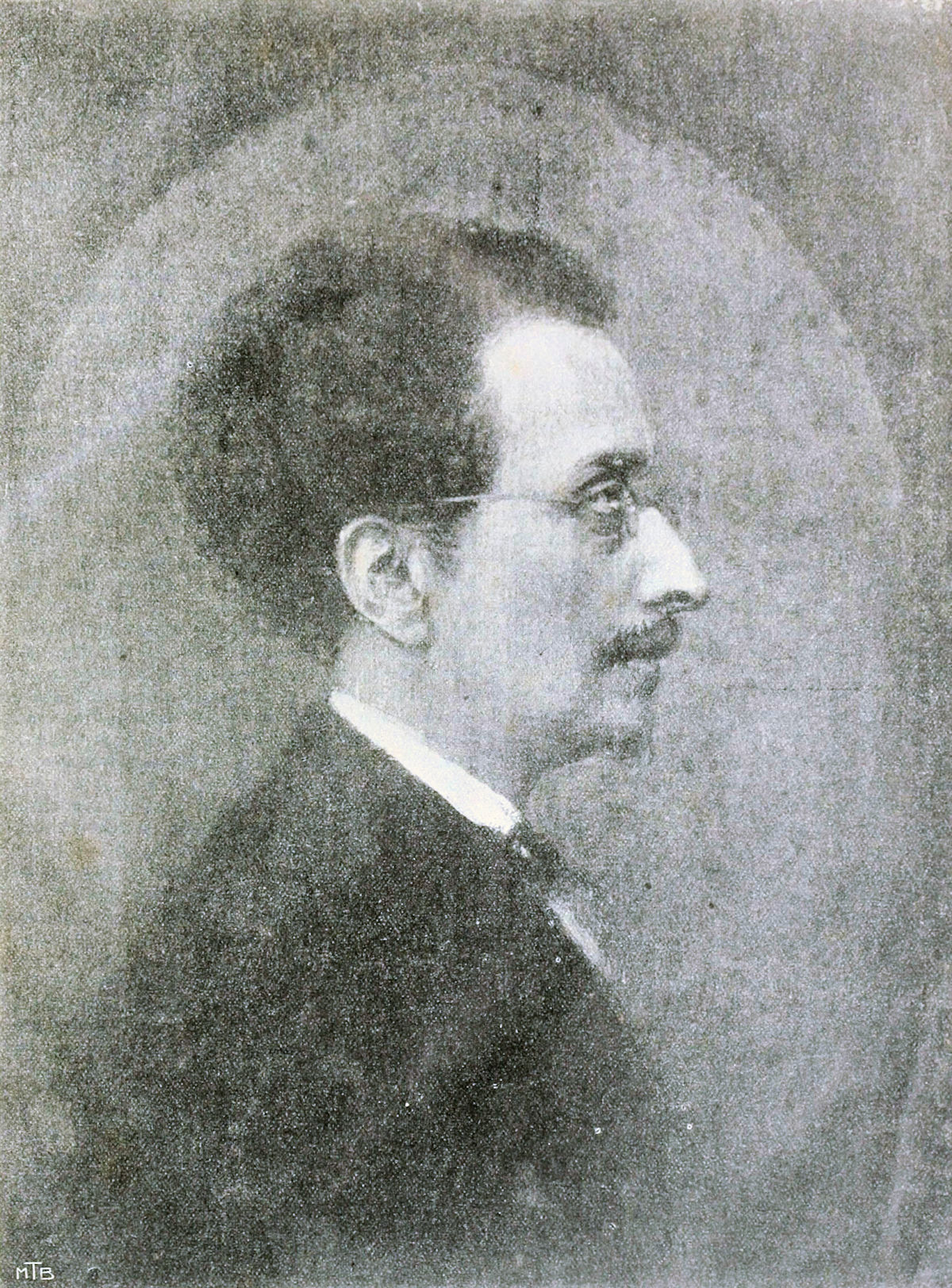 Carlo Poma (1823-1852), patriota, martire di Belfiore.